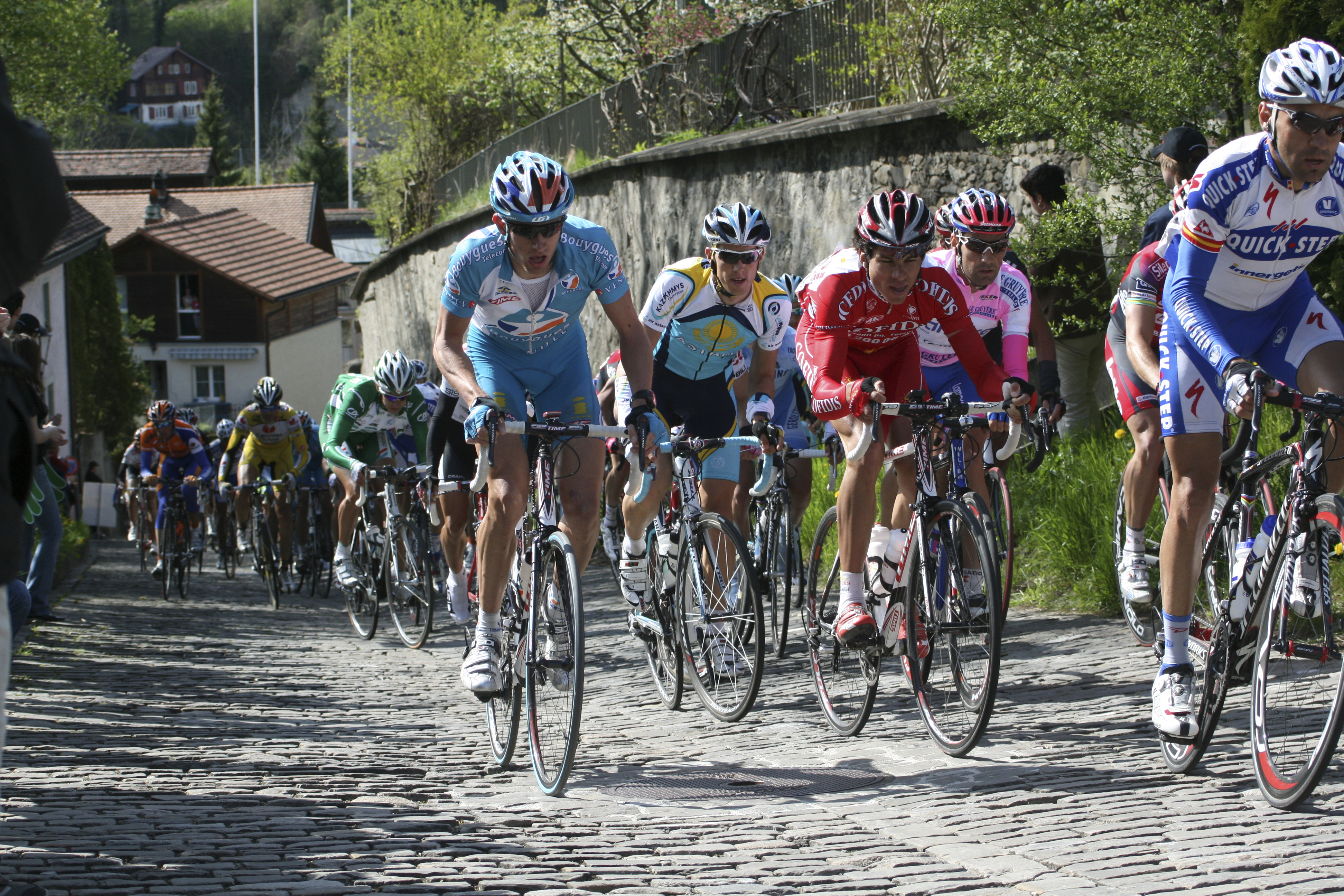 Tour de Romandie 2008 - Fribourg - La Lorette.